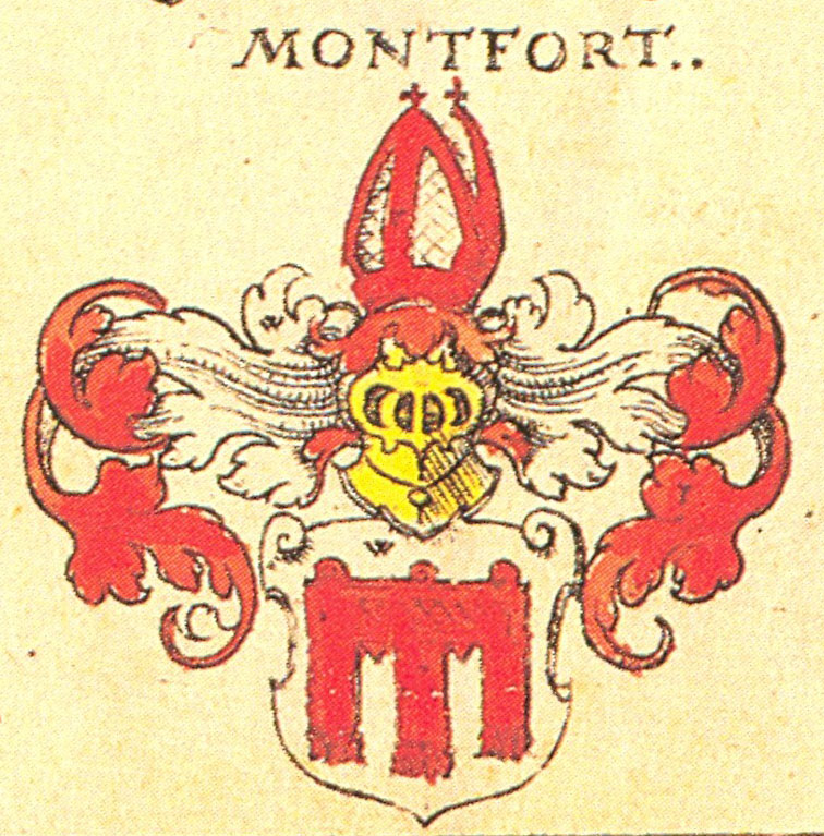 Johann Siebmacher: New Wappenbuch Grafen Montfort